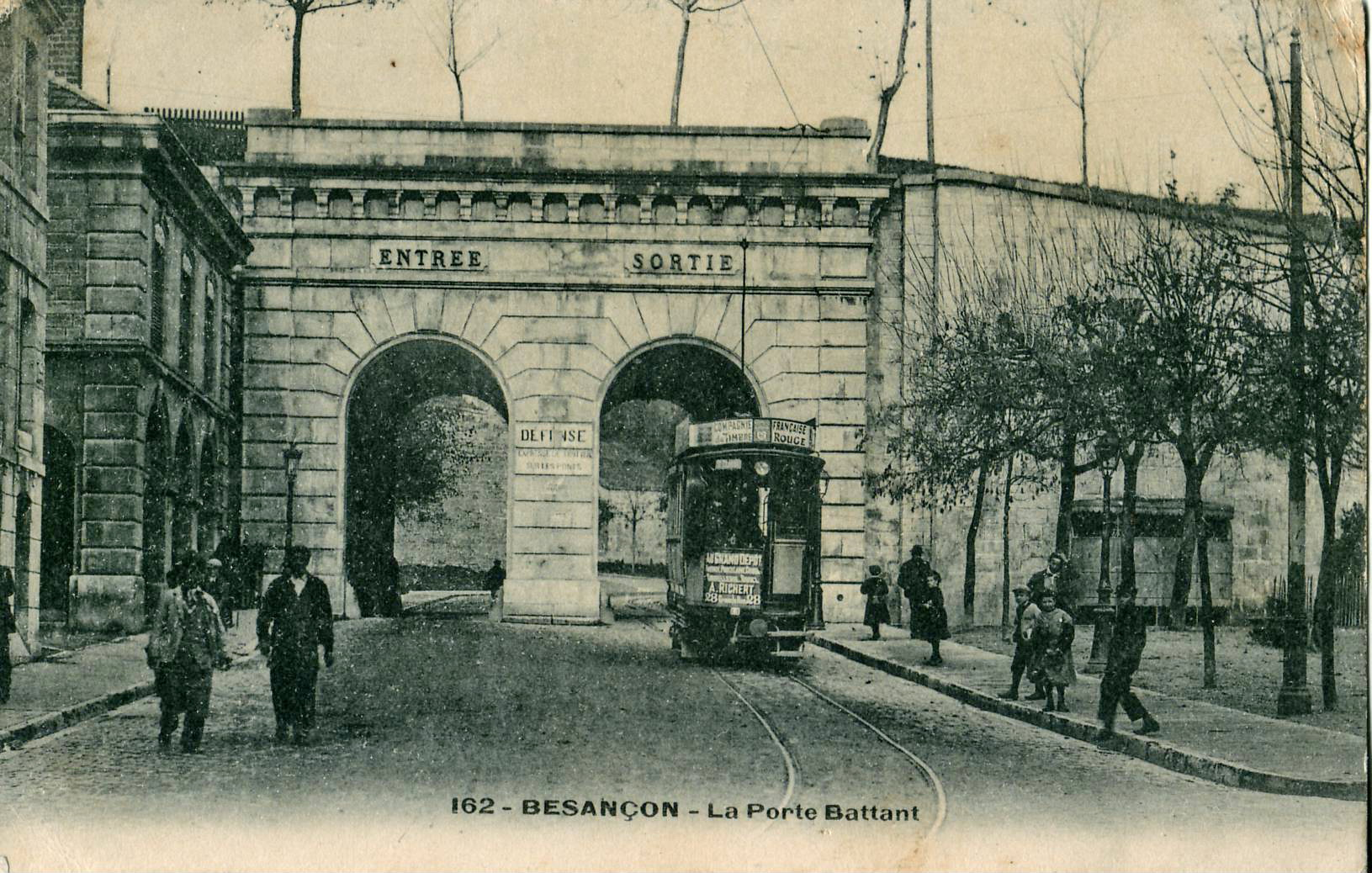 Carte postale ancienne sans mention d'éditeur, n°162 : BESANÇON - La Porte Battant.Vue en gros plan d'une motrice de l'ancien tramway de Besançon